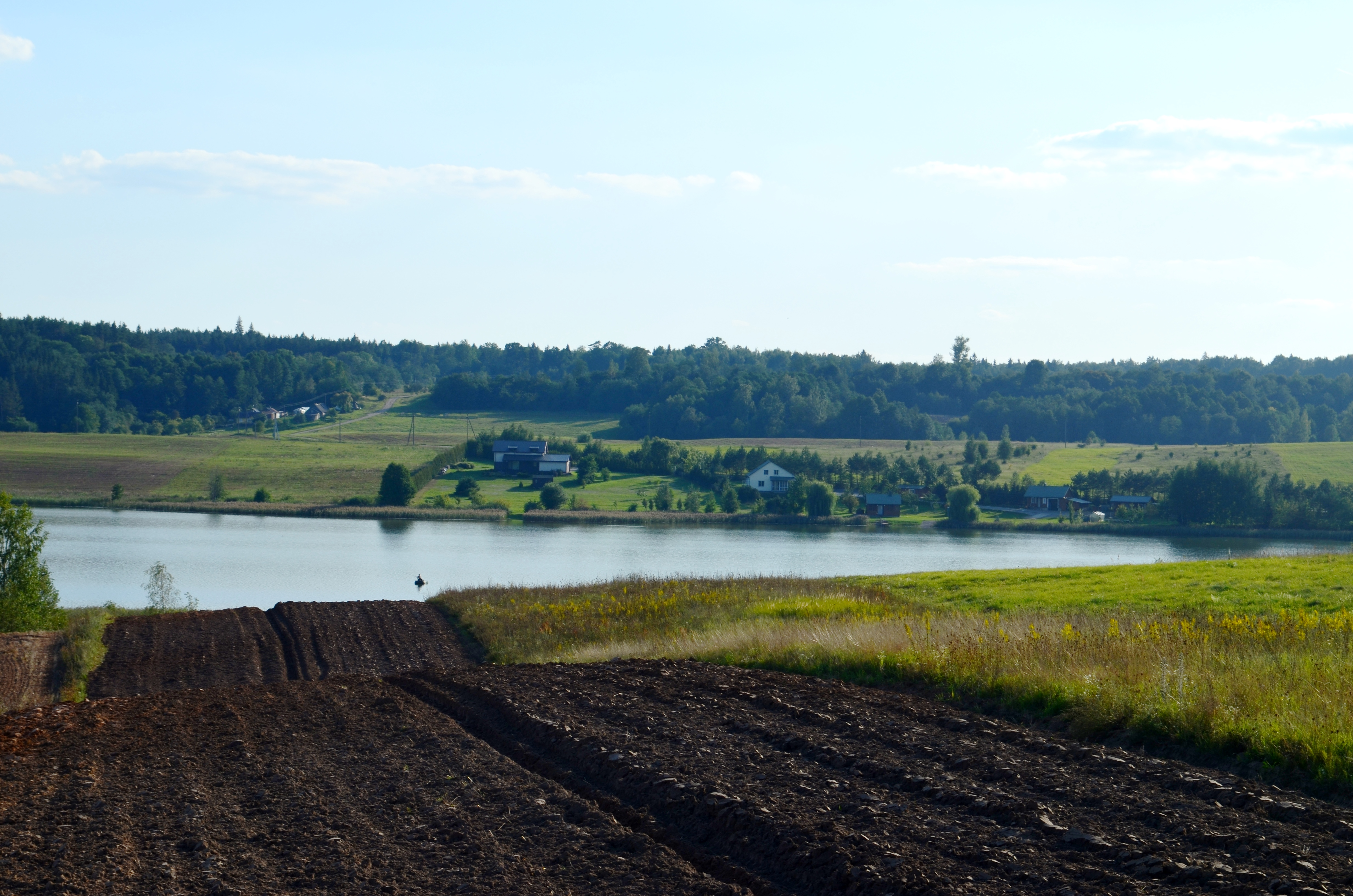 Nestrėvantys, Semeliškių k., Elektrėnų sav.